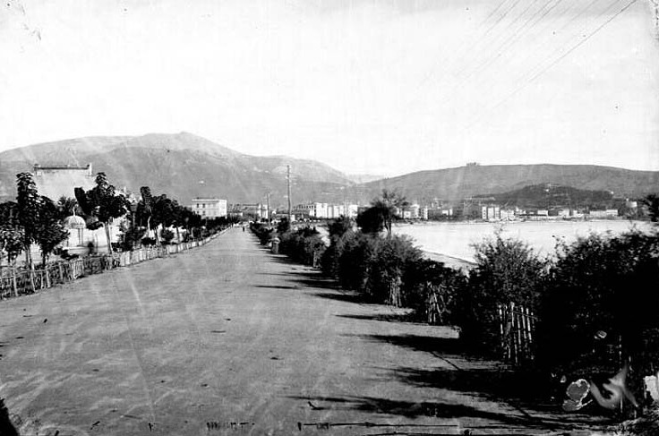 Vue Est, depuis le vallon de Magan, la Promenade des Anglais en 1863, en arrière plan la colline du château.